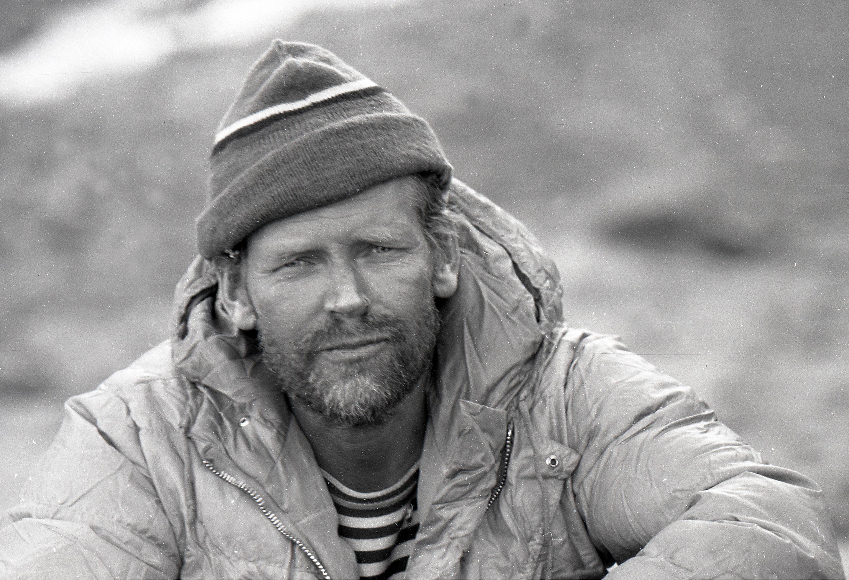 Vello Park